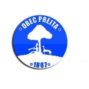 Pečať obce Prejta z roku 1867.